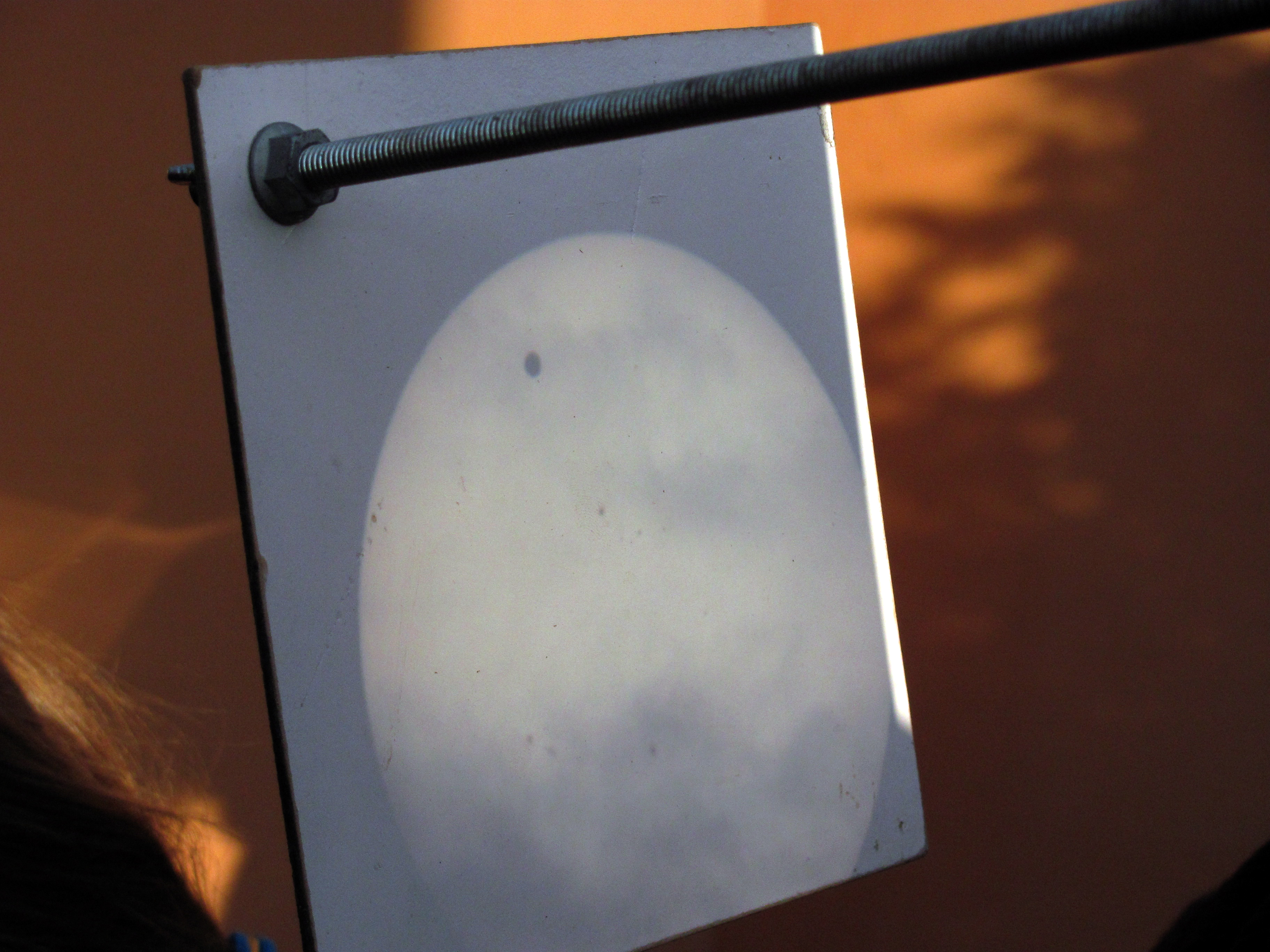 Venuspassagen projicerad på en skiva med hjälp av ett teleskop på Observatoriekullen i Stockholm.